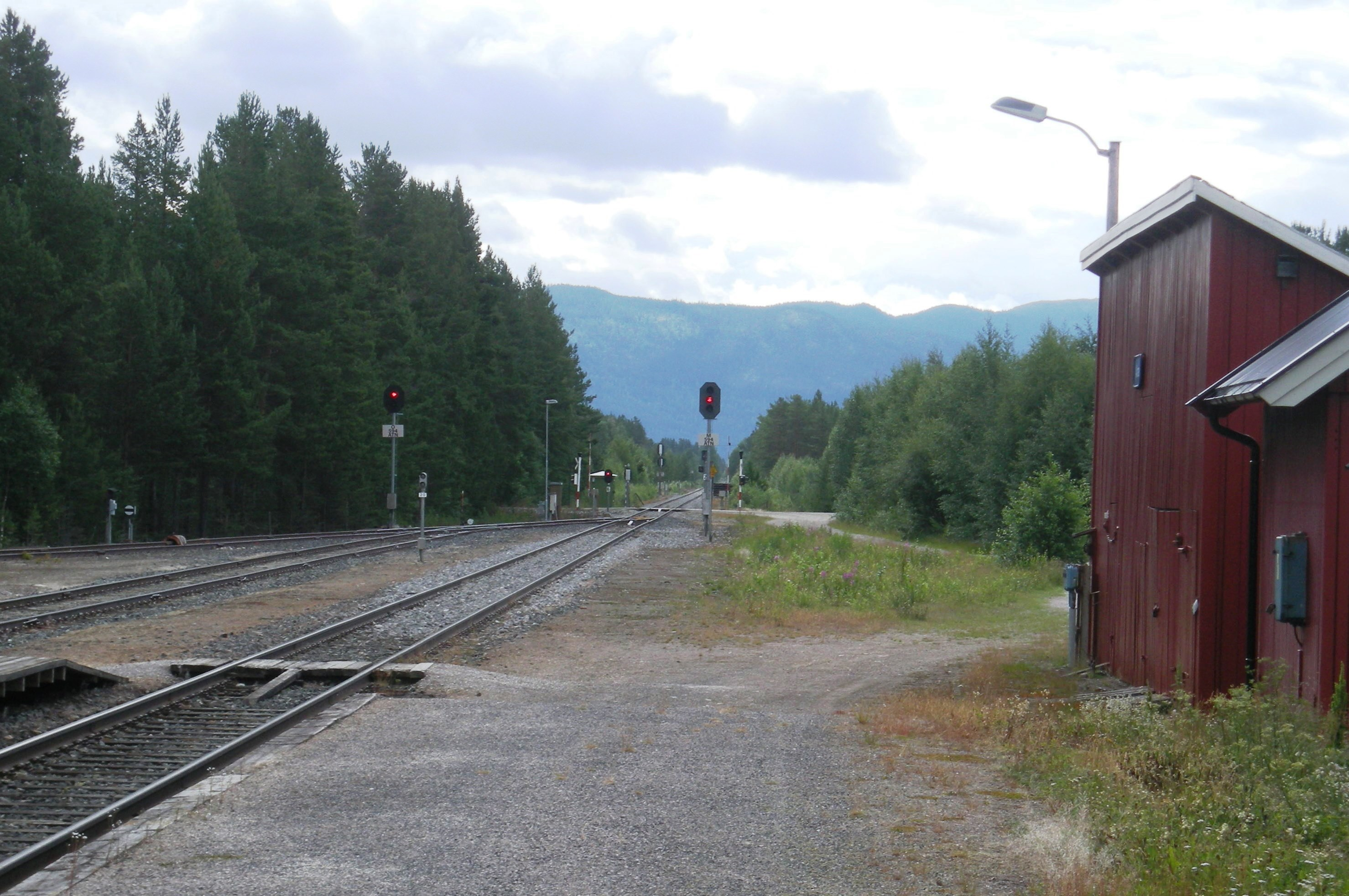 Atneosveien (fylkesvei 633) krysser Rørosbanen sørøst for Atna stasjon.